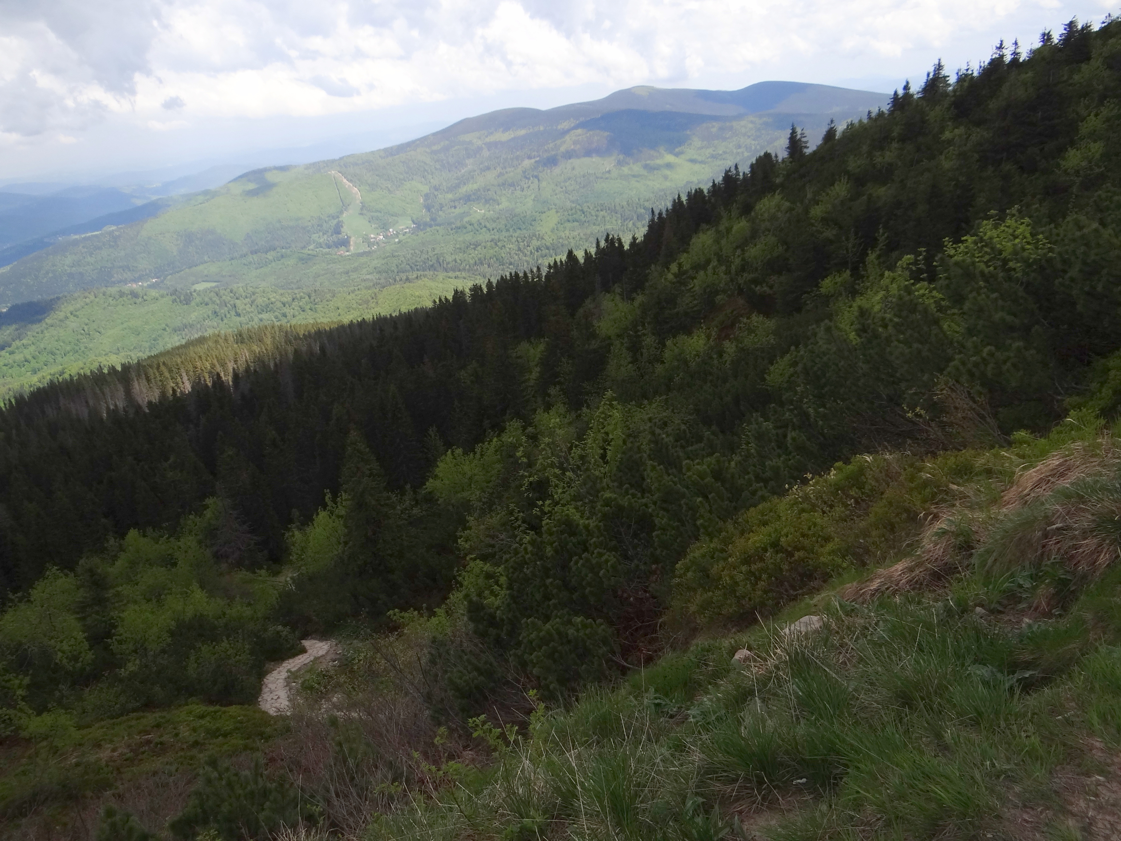 Widok z przełęczy Brona na północny wschód